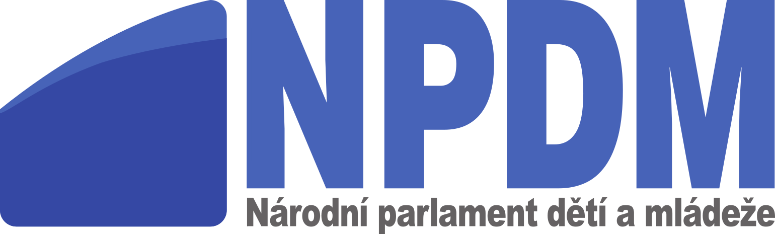 Logo Národního parlamentu dětí a mládeže